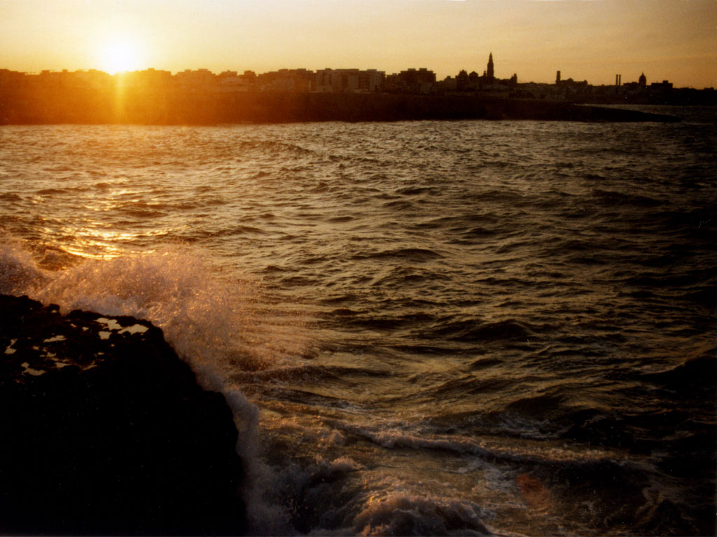 Monopoli, Puglia, Italia